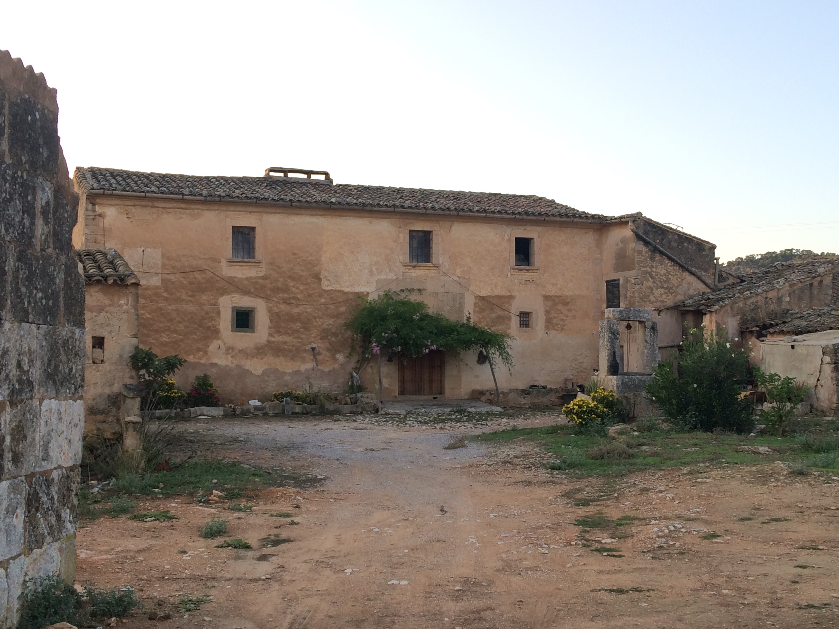 Cases de la possessió de Son Marió a Llucmajor, Mallorca